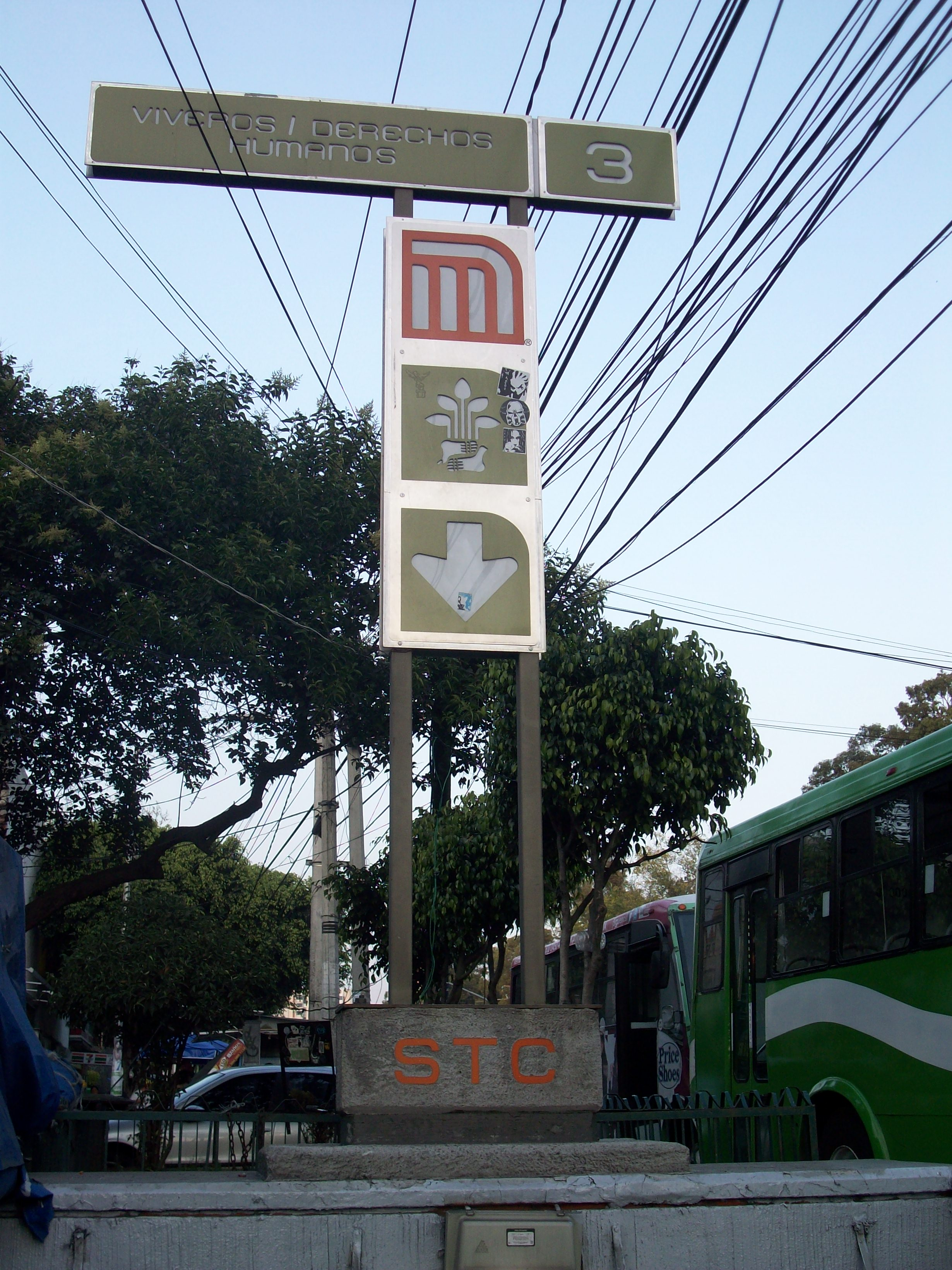 Estela de la Estacion Viveros/Derechos Humanos